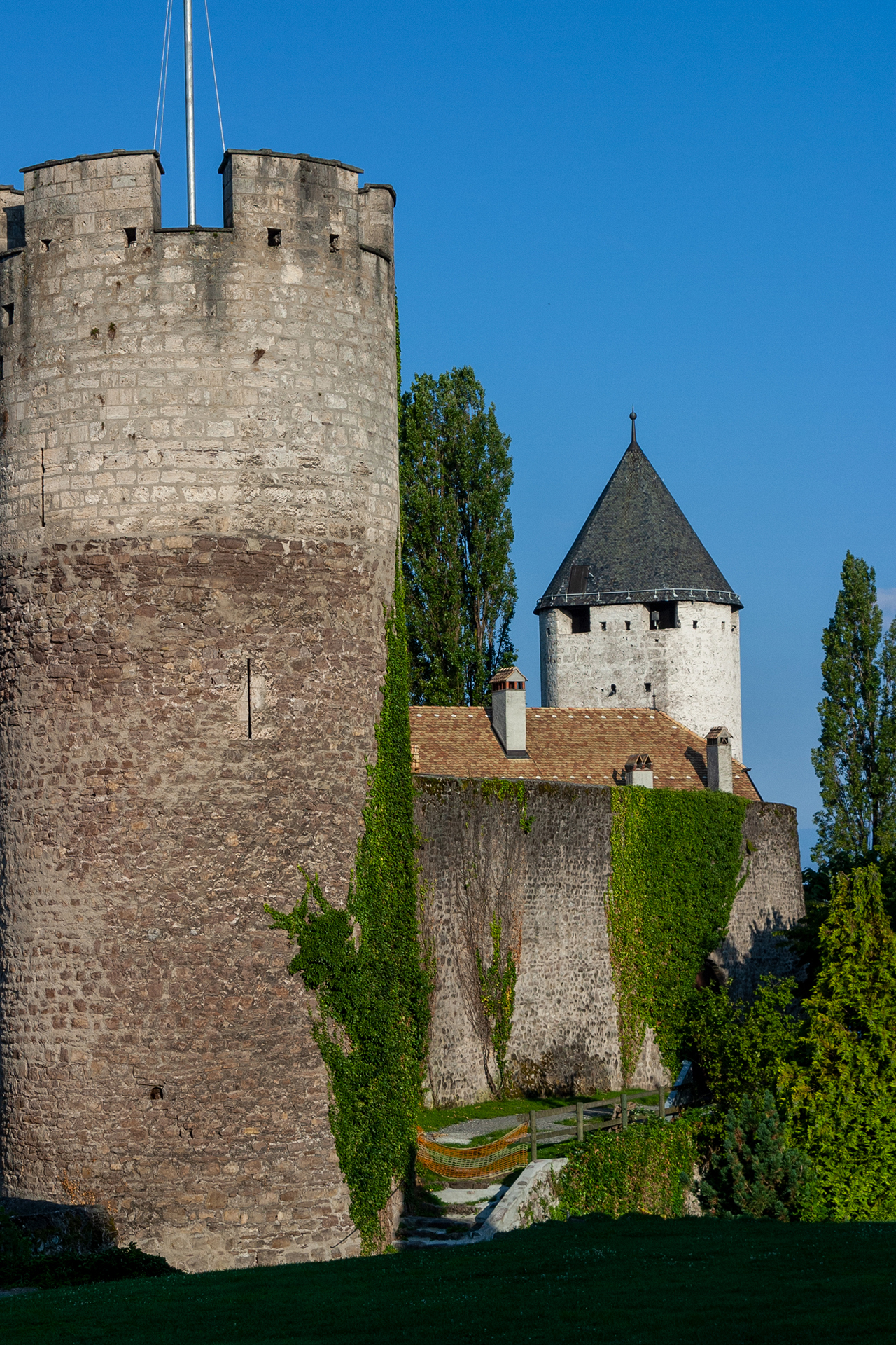 Schloss (Schweizer Spielzeugmuseum) in La Tour-de-Peilz (VD)